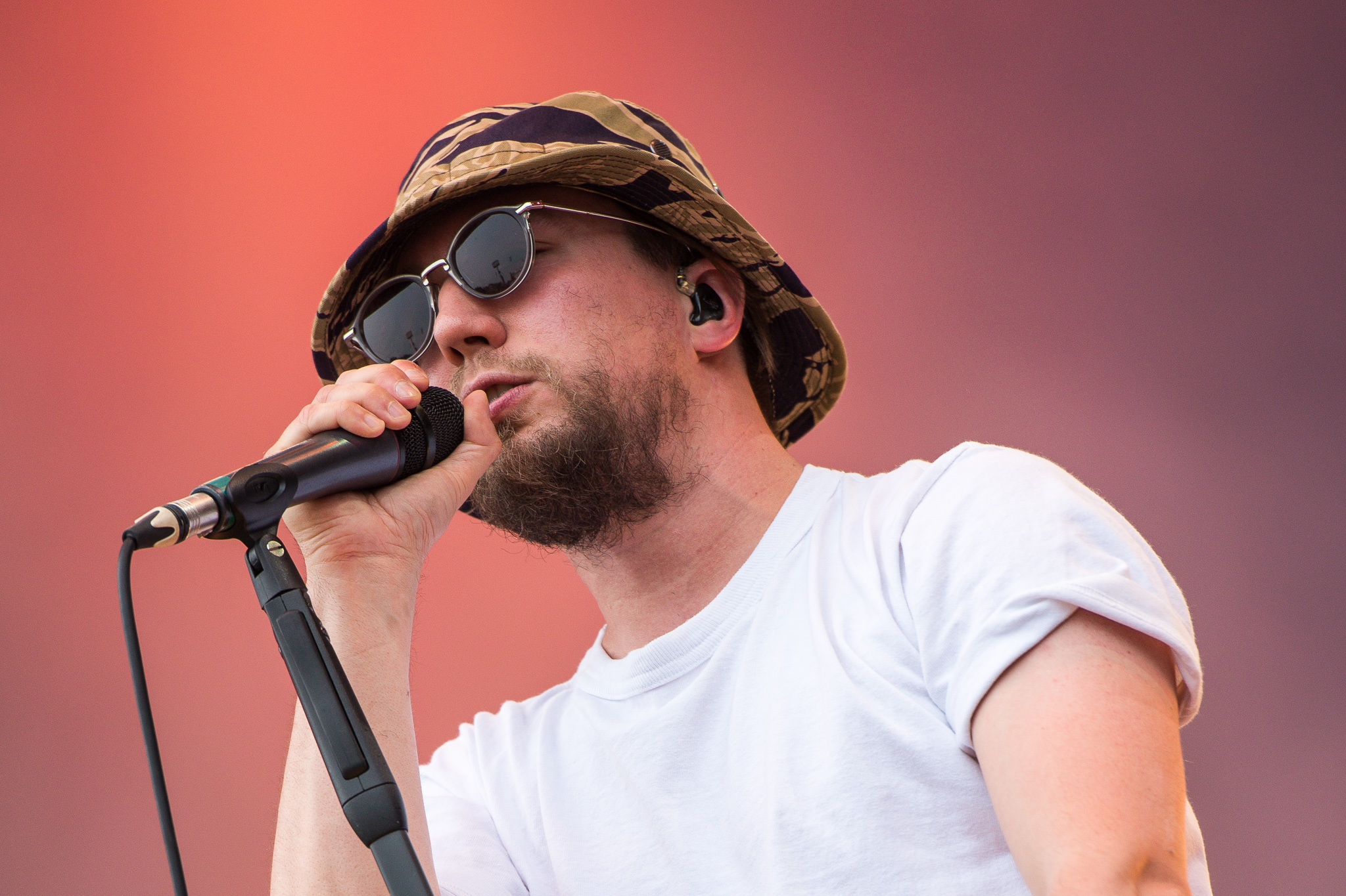 ARGO-Konzerte,Beck's Park Stage,Festival,Friedrich Kautz,Konzert,Livekonzert,Livemusik,Musik,Prinz Pi,RiP,Rock im Park 2015